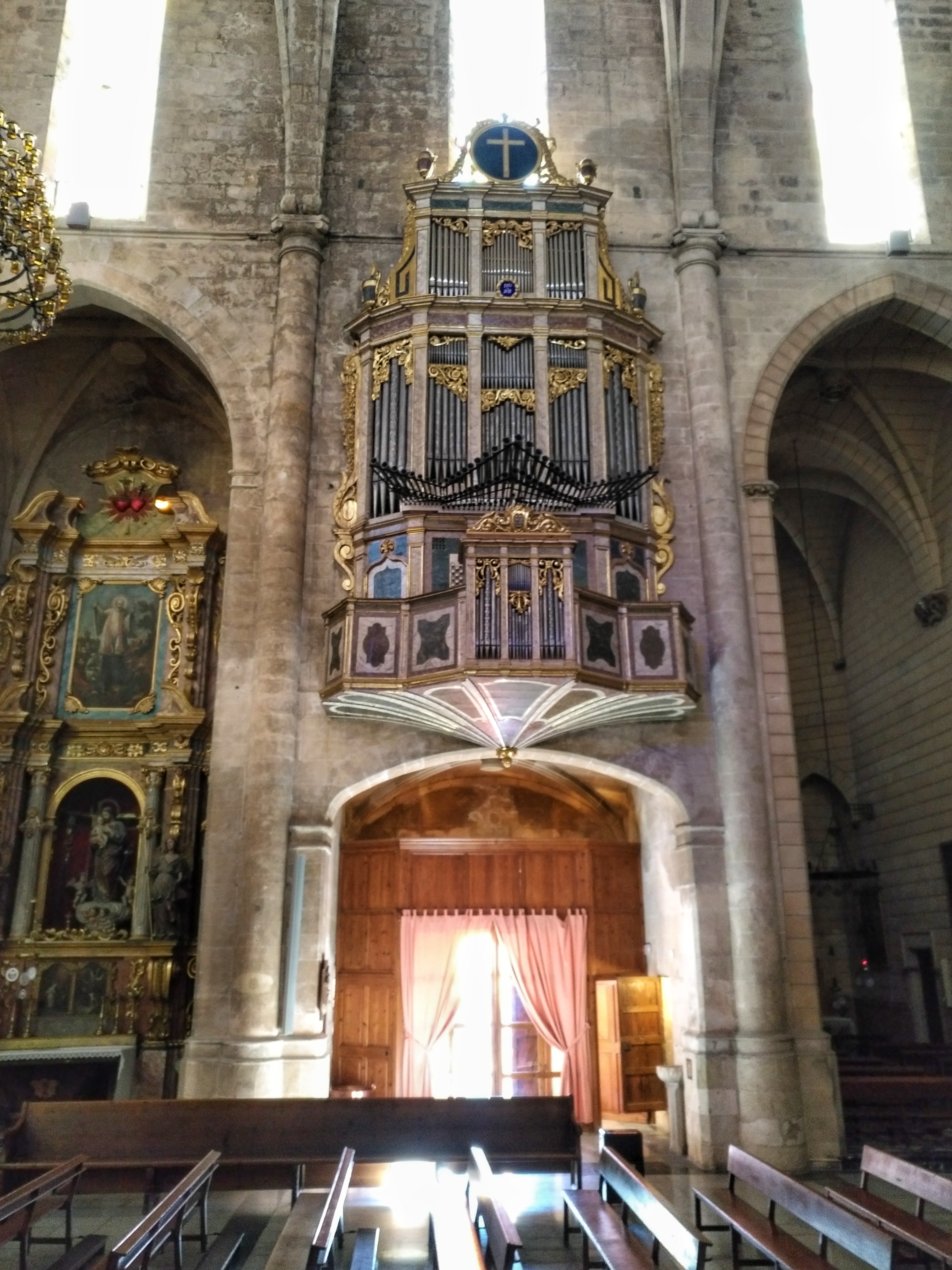 Orgue de Santa Creu. Vista frontal